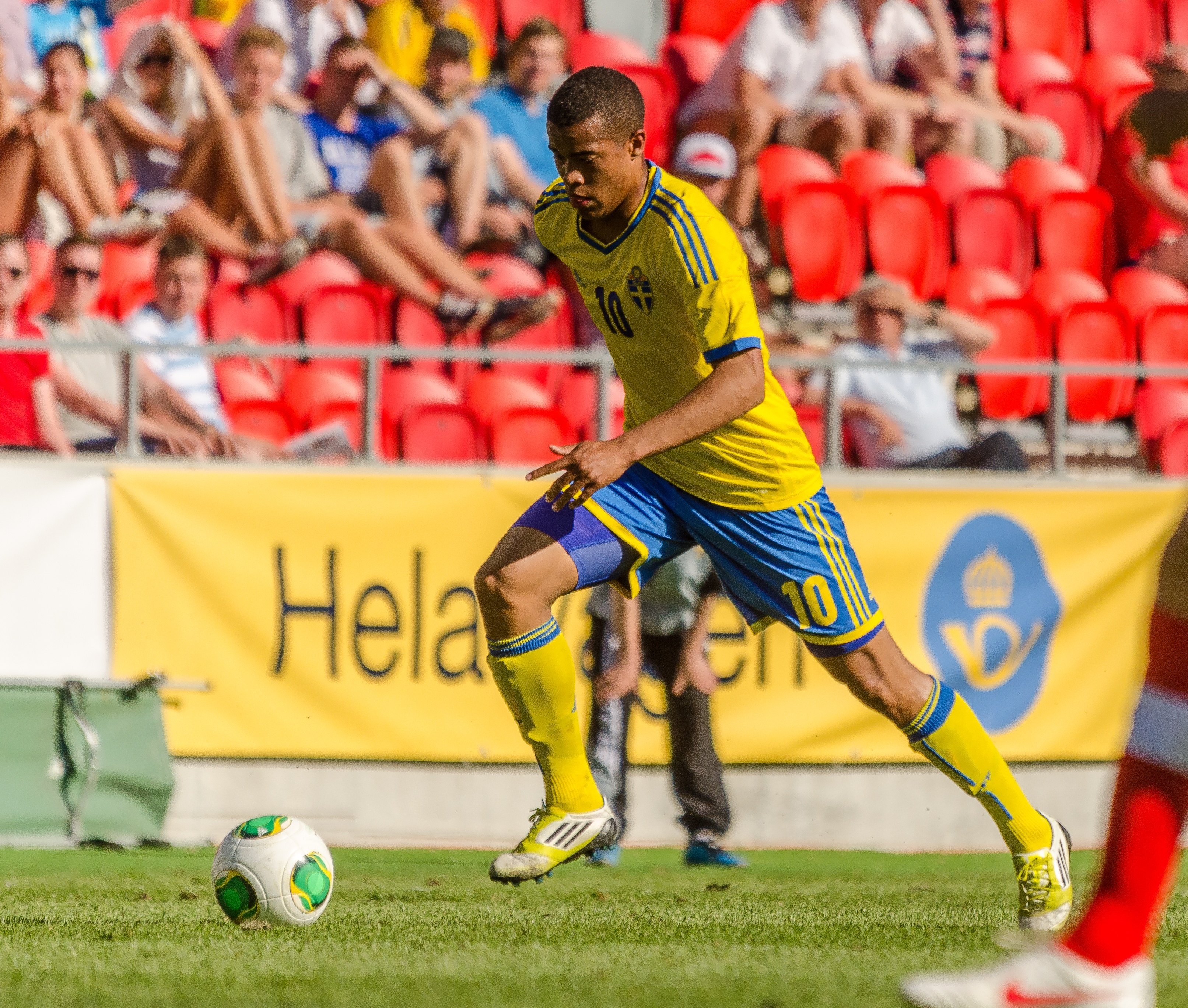 Mittfältaren Robin Quaison i det svenska U21-landslagets 3-2 seger mot Schweiz i en träninglandskamp på Myresjöhus Arena i Växjö, 6/6 2013.